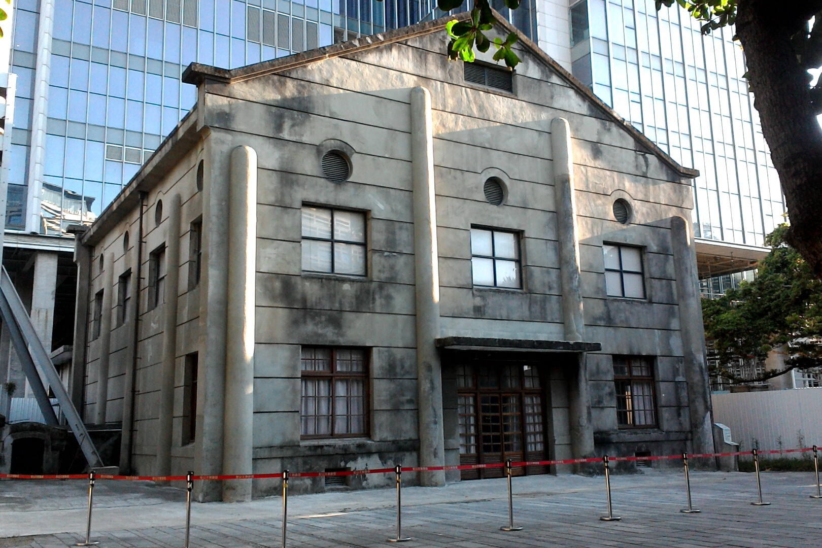 松山菸廠鍋爐房,台北市信義區三張犁次分區新仁里